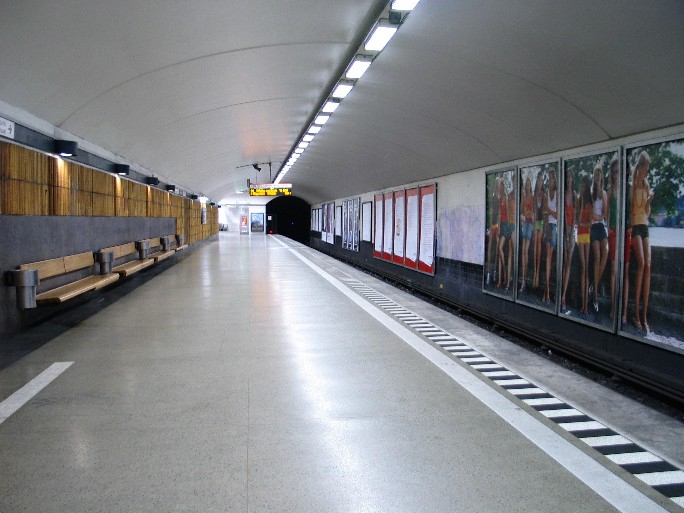 Mariatorget, a metro station in Stockholm, Sweden.